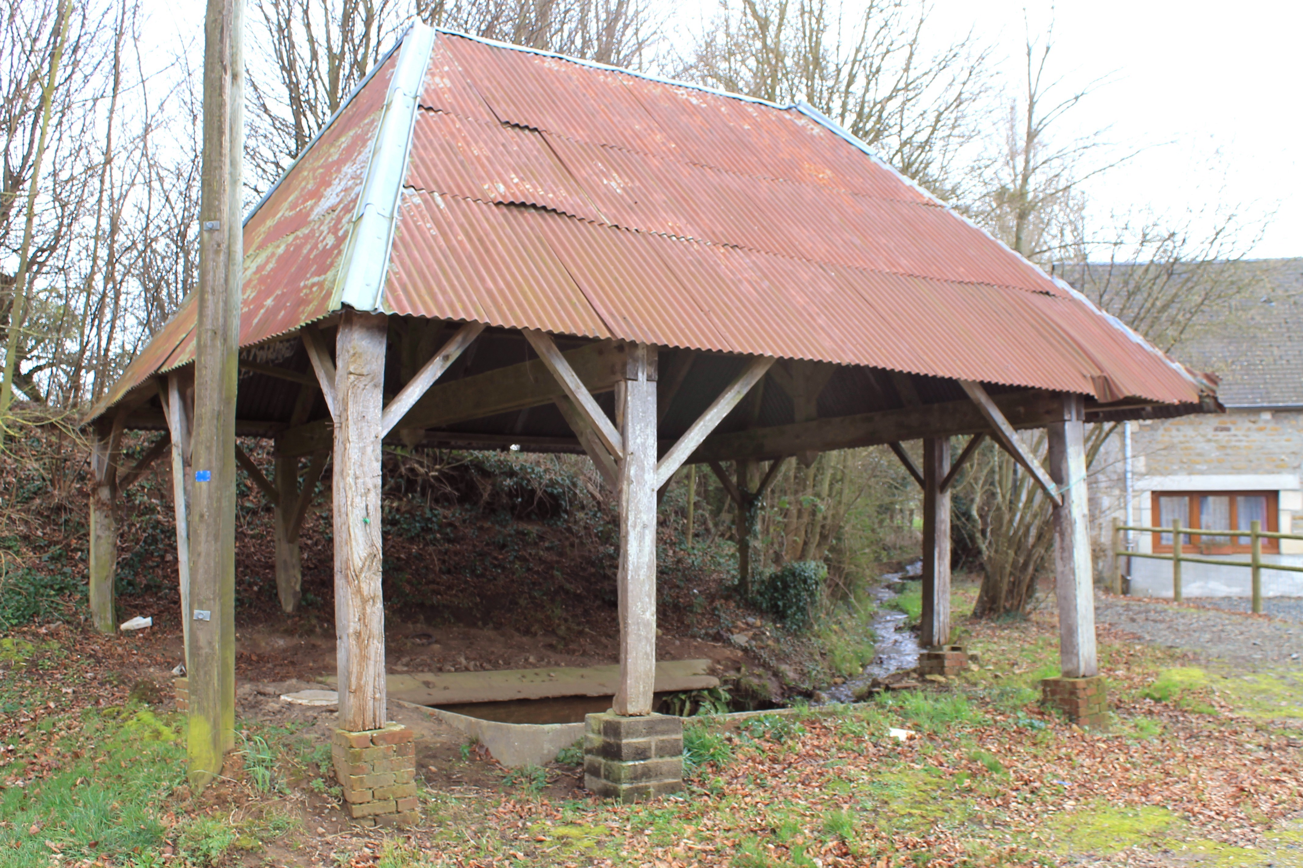 Lavoir du Pont Fradel à Acqueville (Calvados)